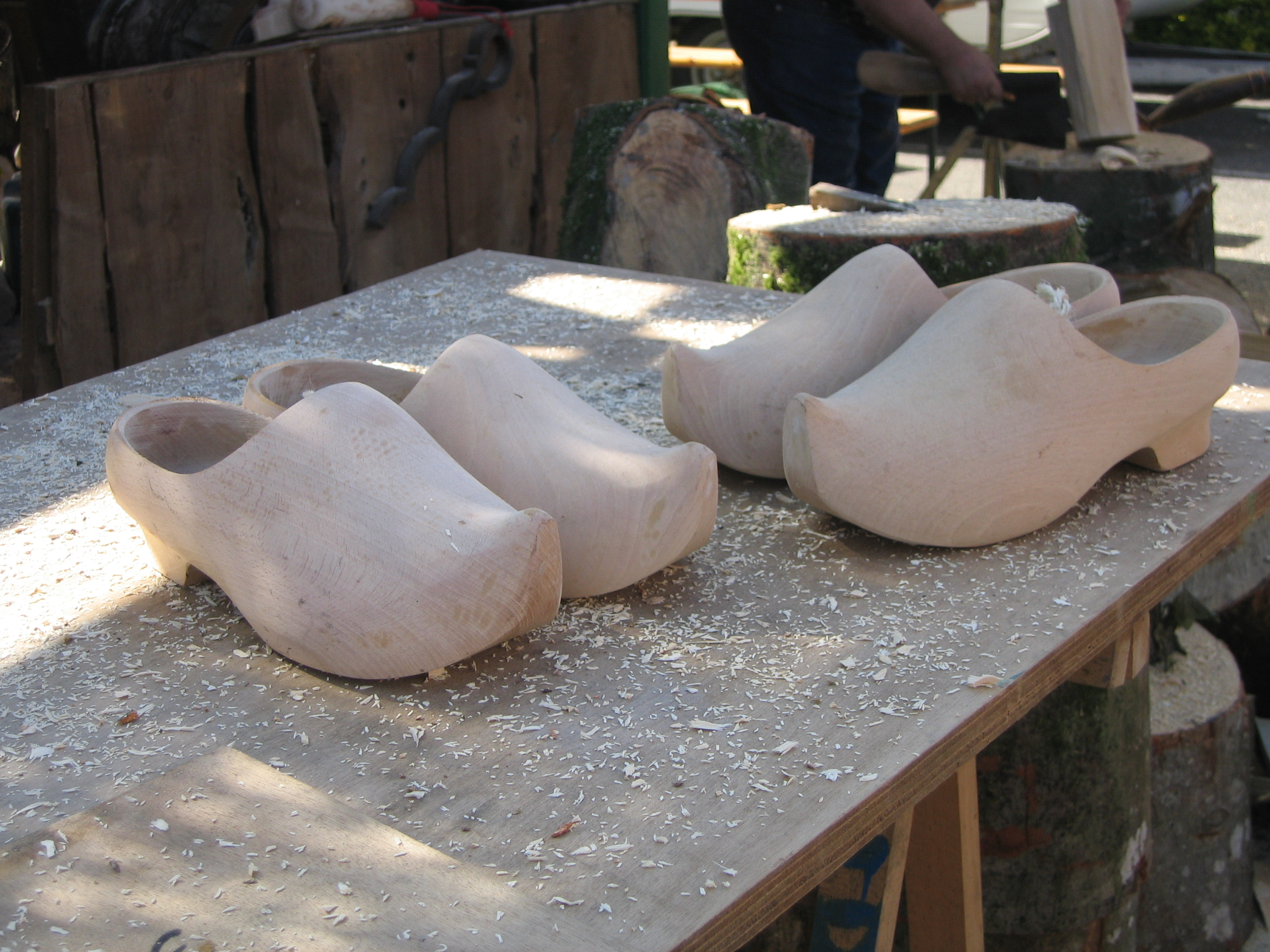 Etape de la fabrication mécanisée d'un sabot.